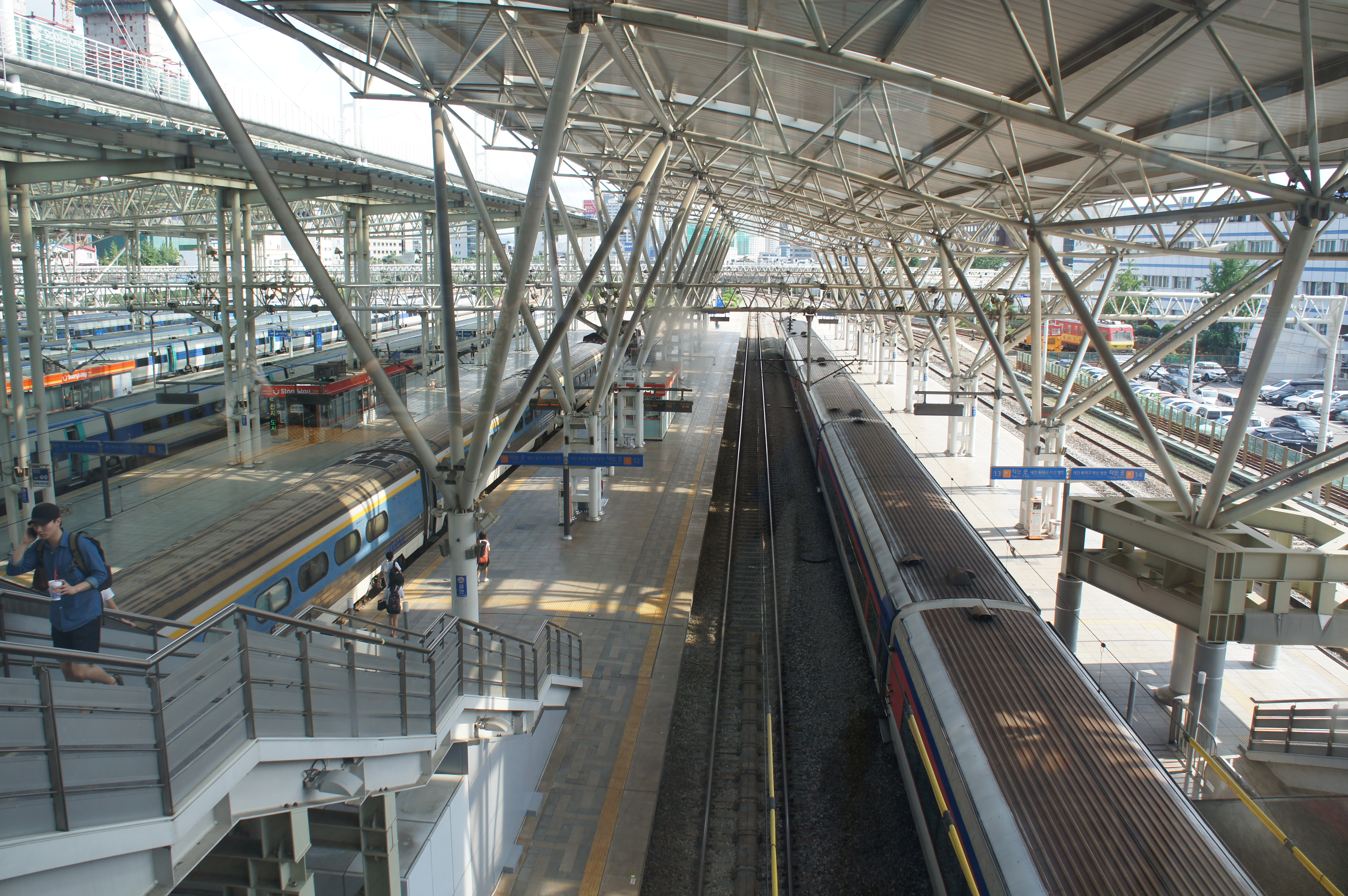 서울역 승강장 전경